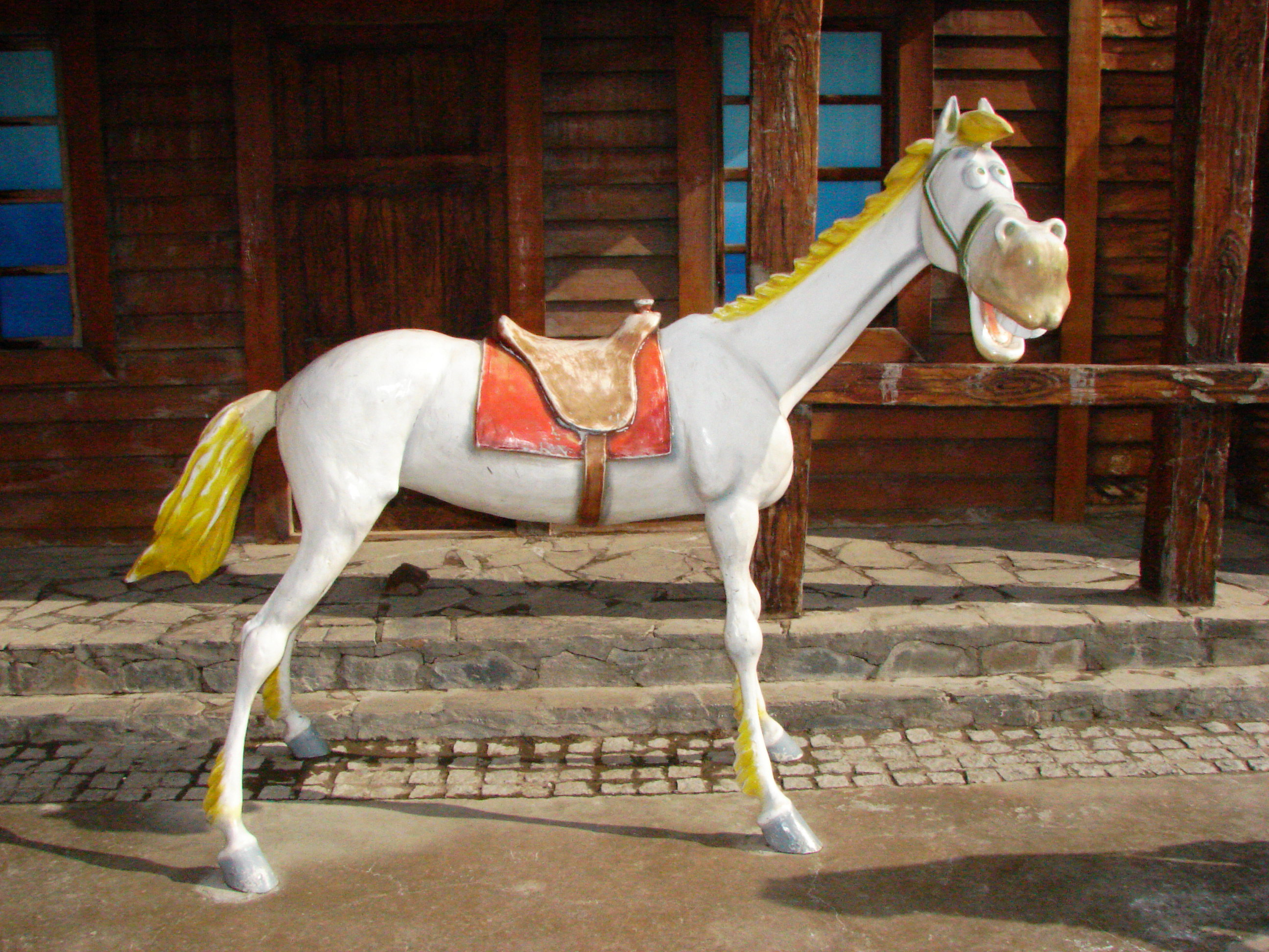 Ankara Amusement Park